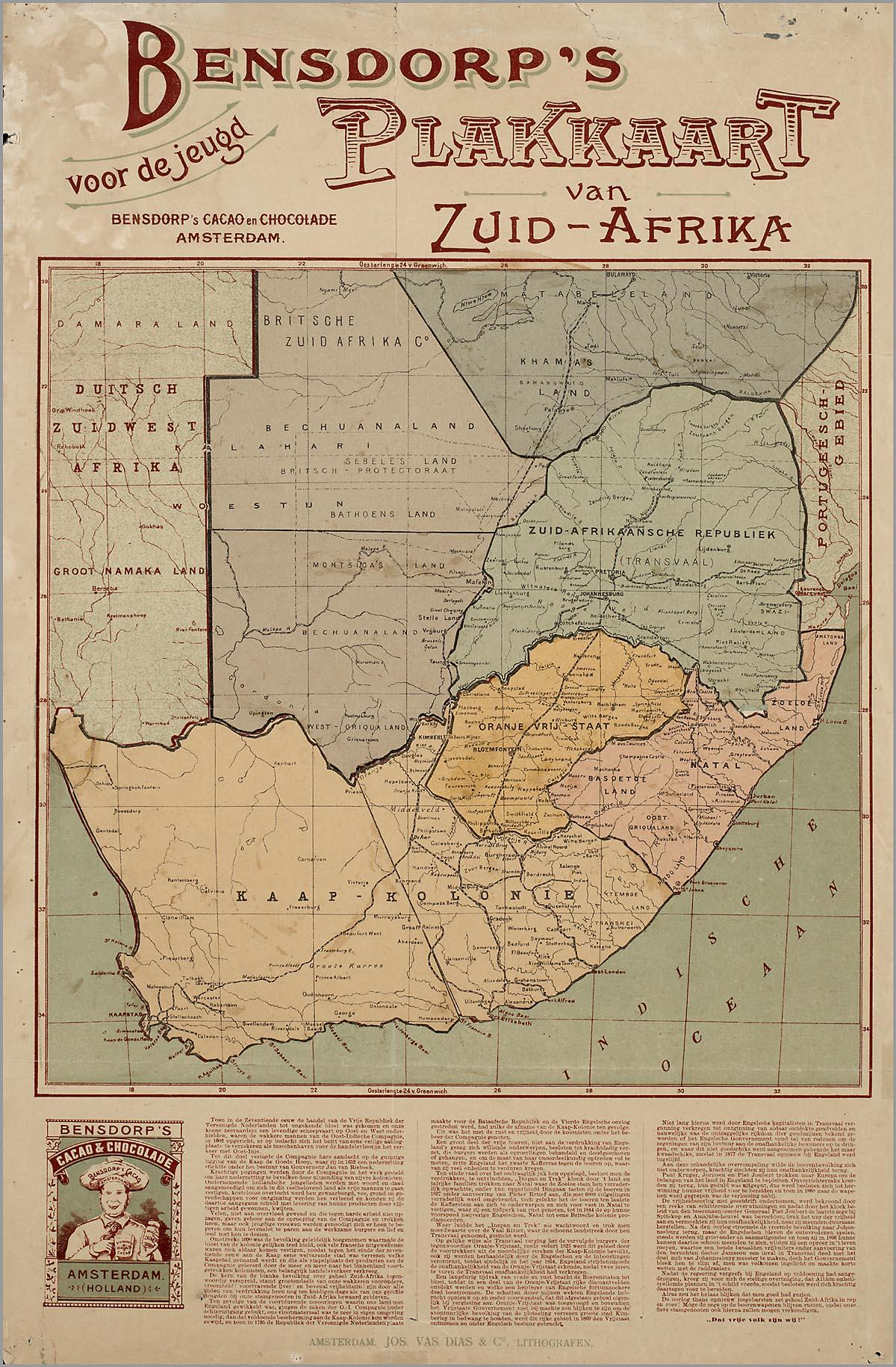 Klein drukwerk: Bensdorp's Plakkaart van Zuid-Afrika voor de jeugd. Drukker: Jos. Vas Dias & Co. Opdrachtgever/adverteerder: Hollandsche Cacao- en Chocoladefabrieken v/h Bensdorp (Amsterdam).